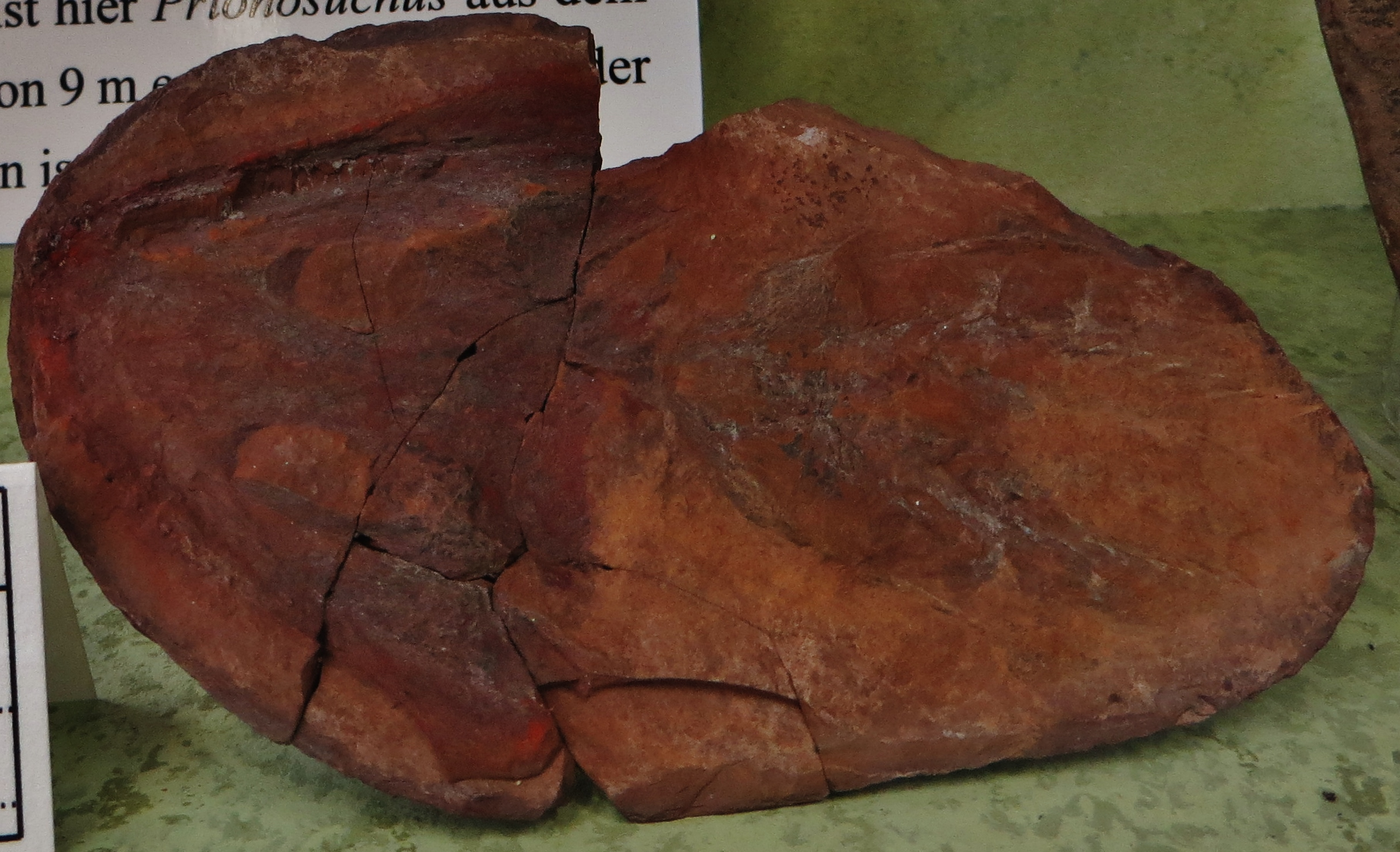 Fossil of Cheliderpeton - Took the picture at Natural History Museum, Bonn University